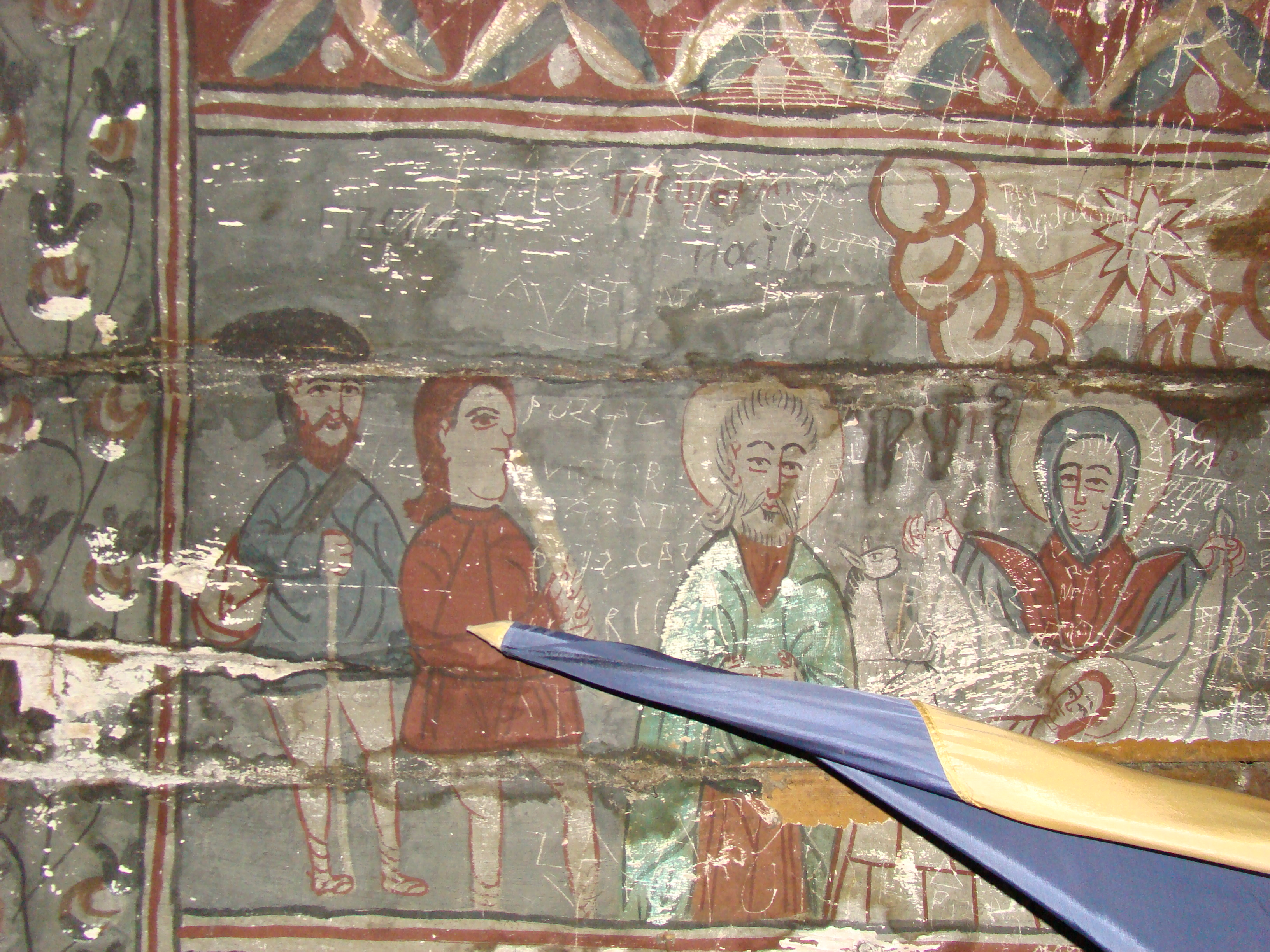 Biserica de lemn din Ticu-sat, județul Cluj